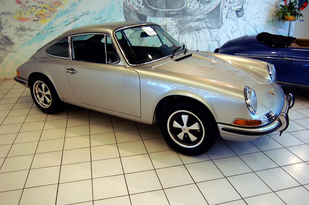 1969 Porsche 911 E at Auto Salon Singen, Germany.Porsche 911E, 1969